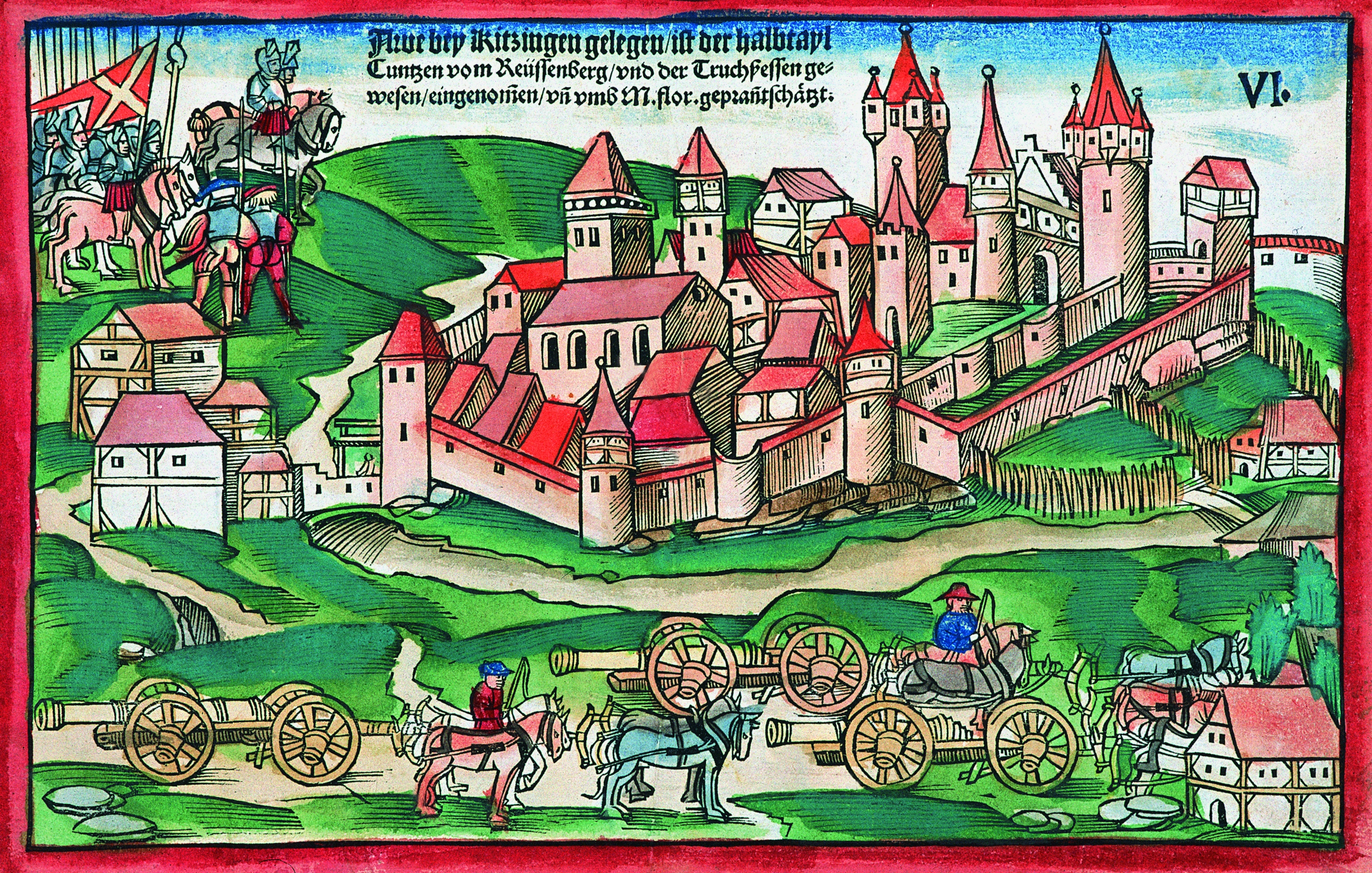 Bild aus dem Burgenbuch der Staatsbibliothek Bamberg, Staatsbibliothek Bamberg, RB.H.bell.f.1